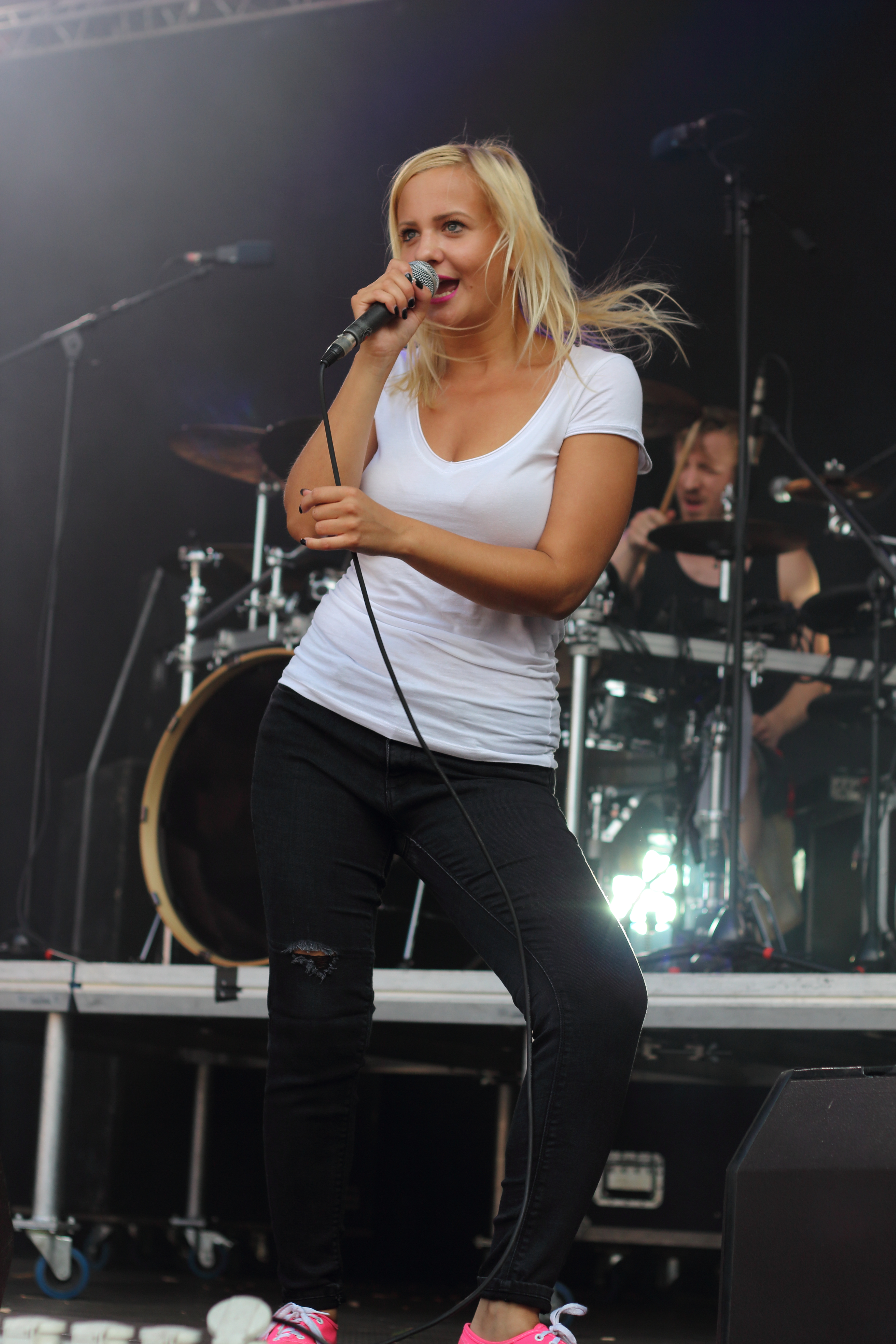 PictureOn 2014